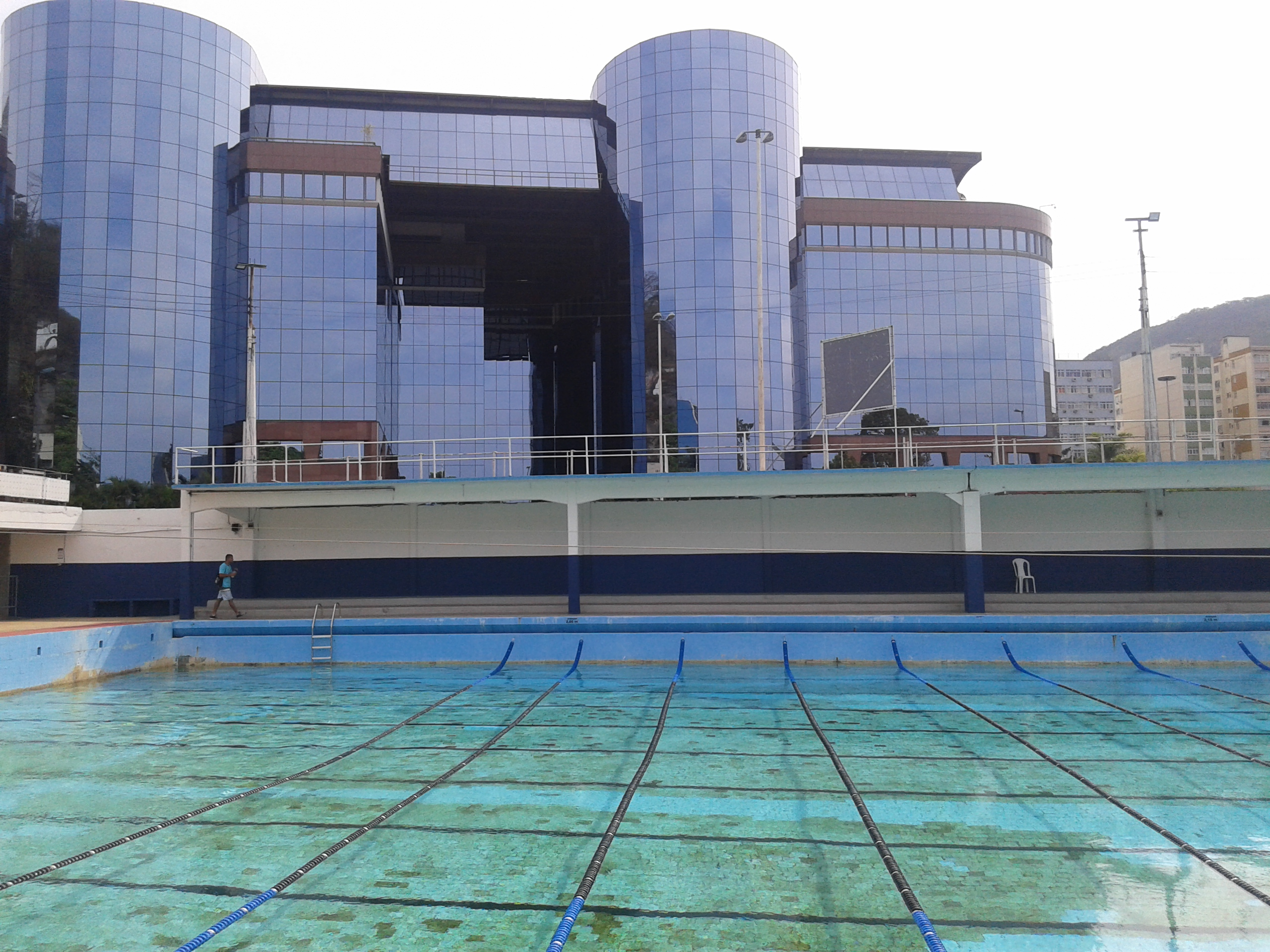 Piscina Olimpica Centenária - Clube de Regatas Guanabara - Botafogo - Rio de Janeiro - Brazil